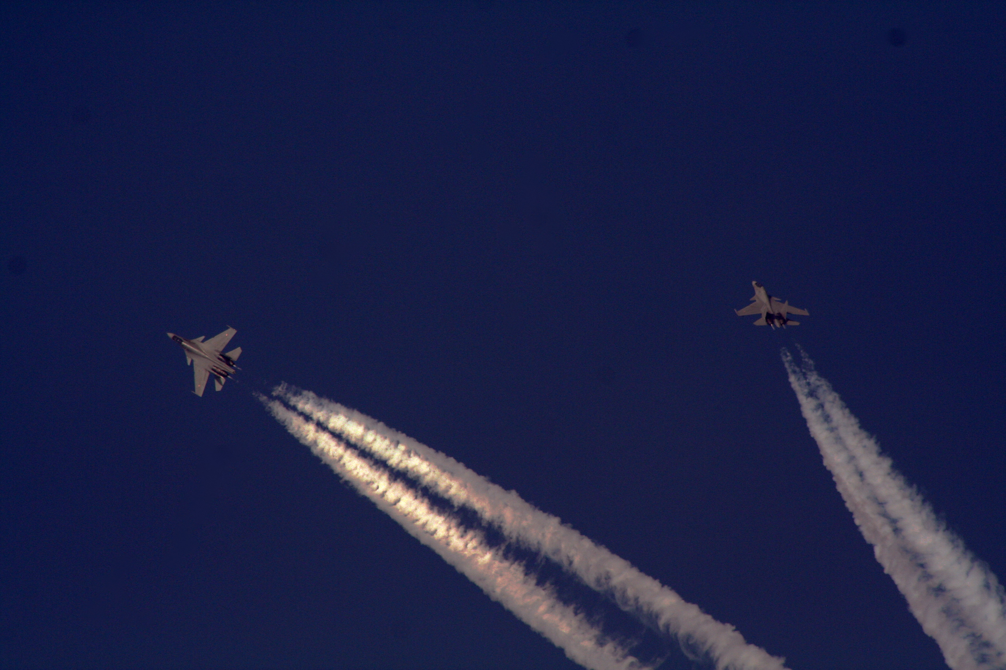 Sukhoi Su-30MKI